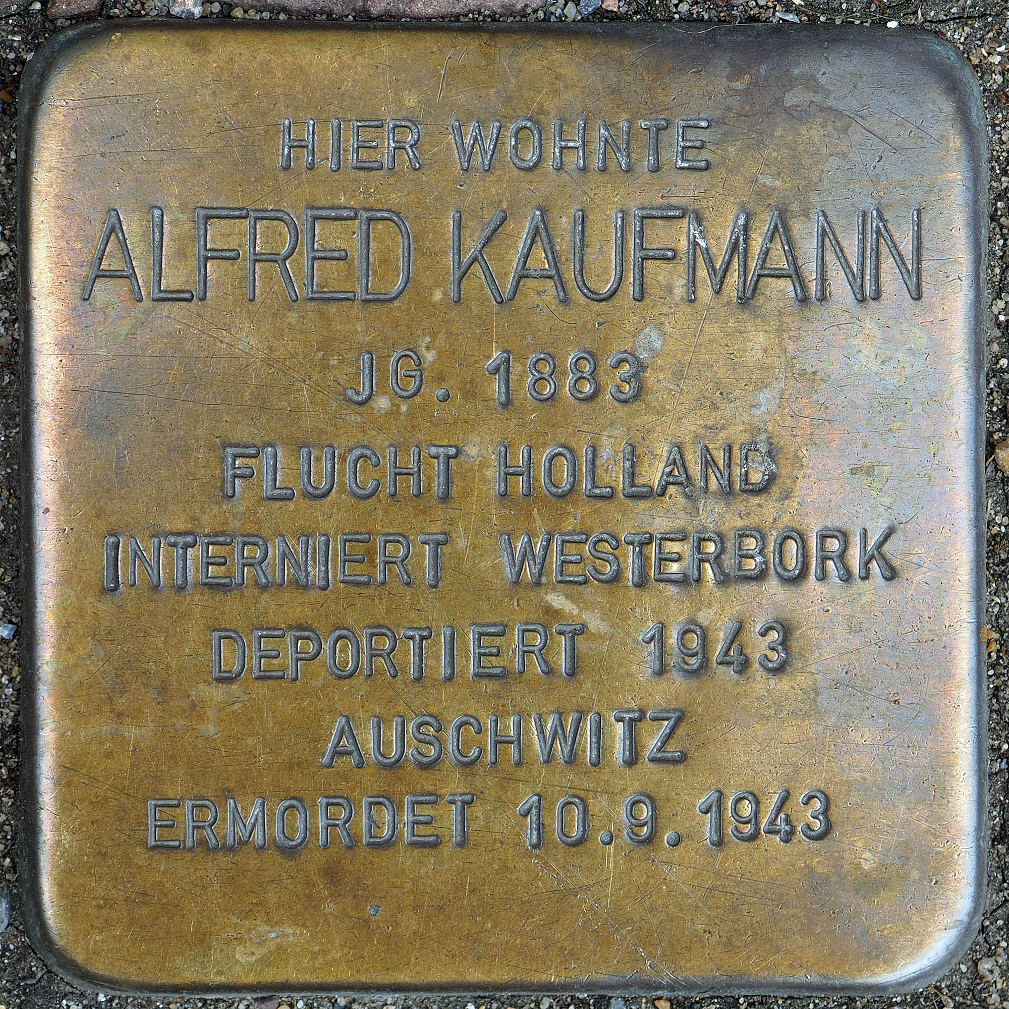 Stolperstein Geldern Hartstraße 2 Alfred Kaufmann